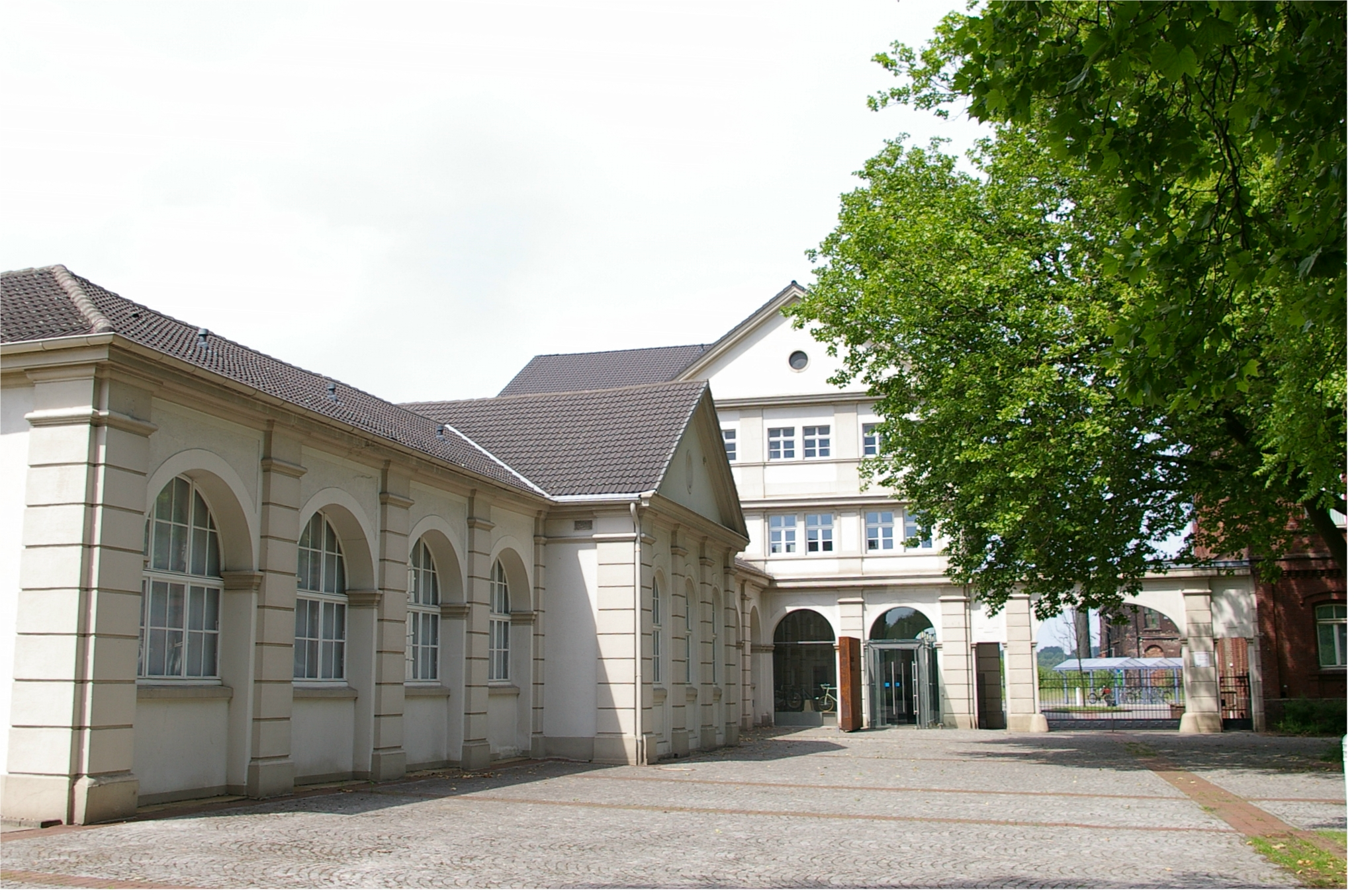 Hoesch-Museum Dortmund, Eberhardtstr.13